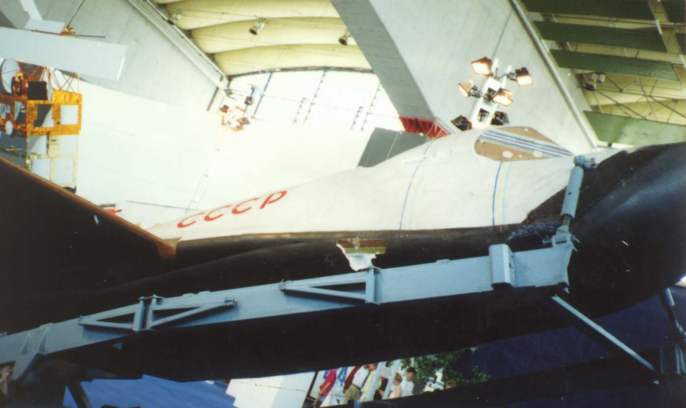 Bor Sovietisches Versuchsmodell für einen Raumgleiter